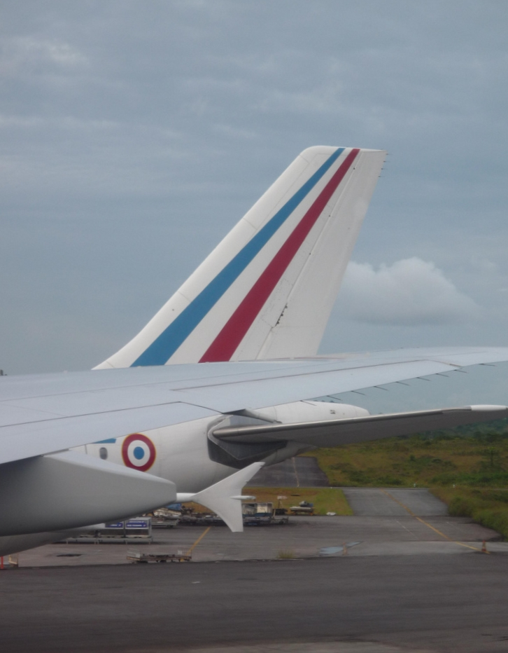 Et cocarde.